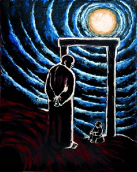 Lena Hades' Gemälde "Zarathustra und Zwerg". 137x177 cm.